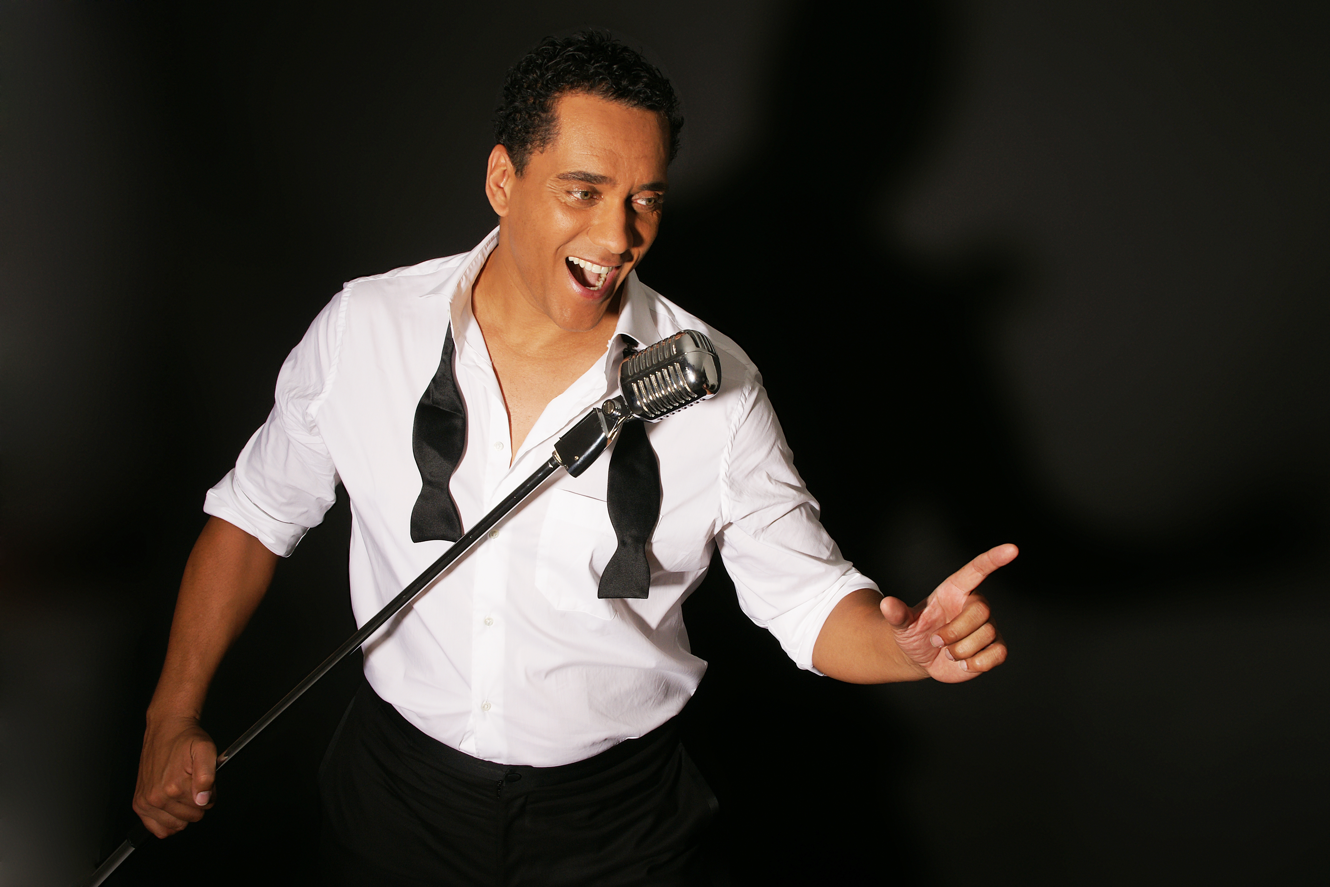 Nederlands zanger